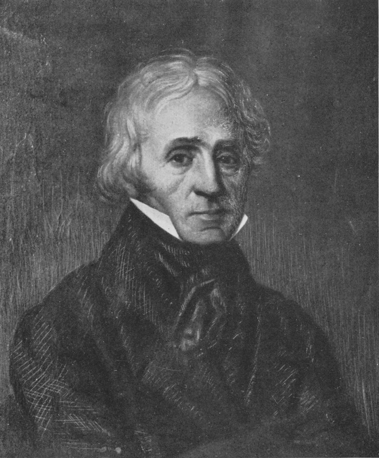 Portrait Louis Berlioz